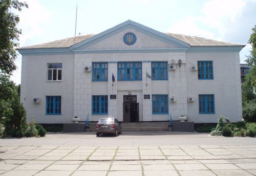 Здание Кураховского горсовета. Украина. Донецкая область.